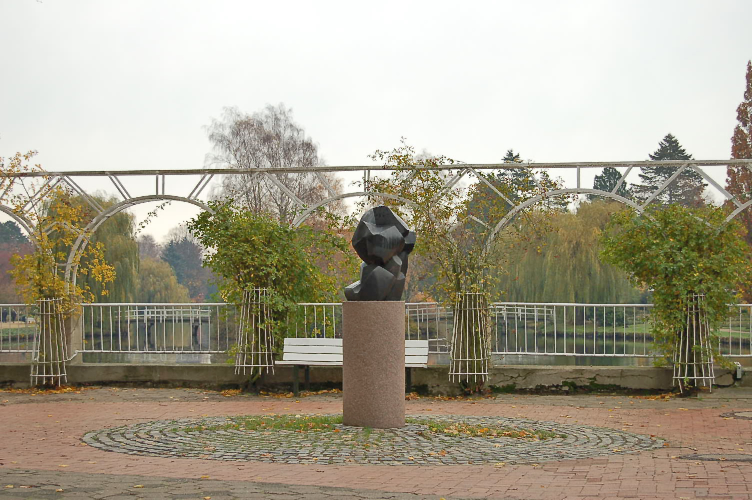 Der Haupteingang Rosarium Uetersen